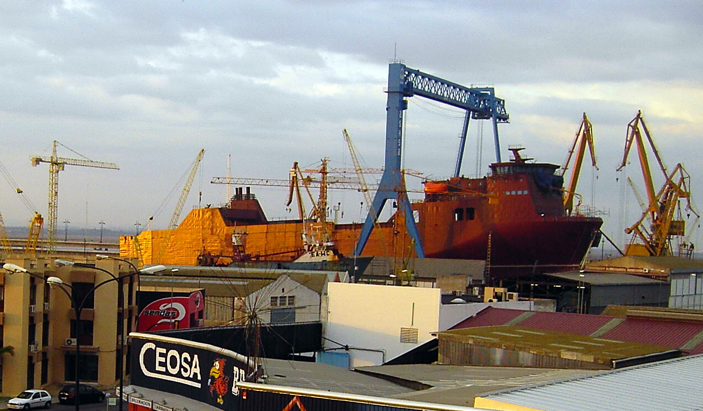 Astilleros de Huelva. Muelle interior. (Huelva, España)